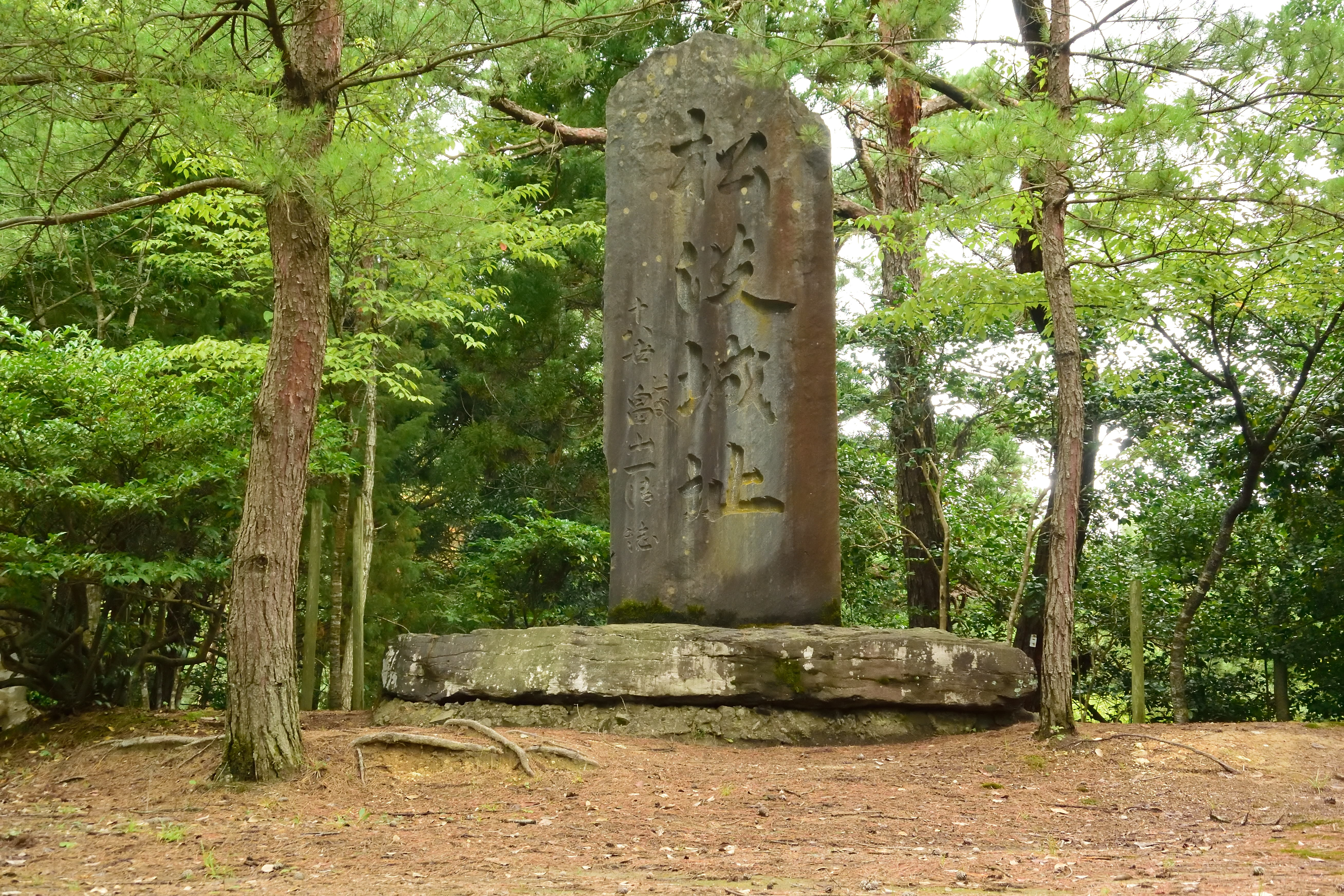 松波城址の碑